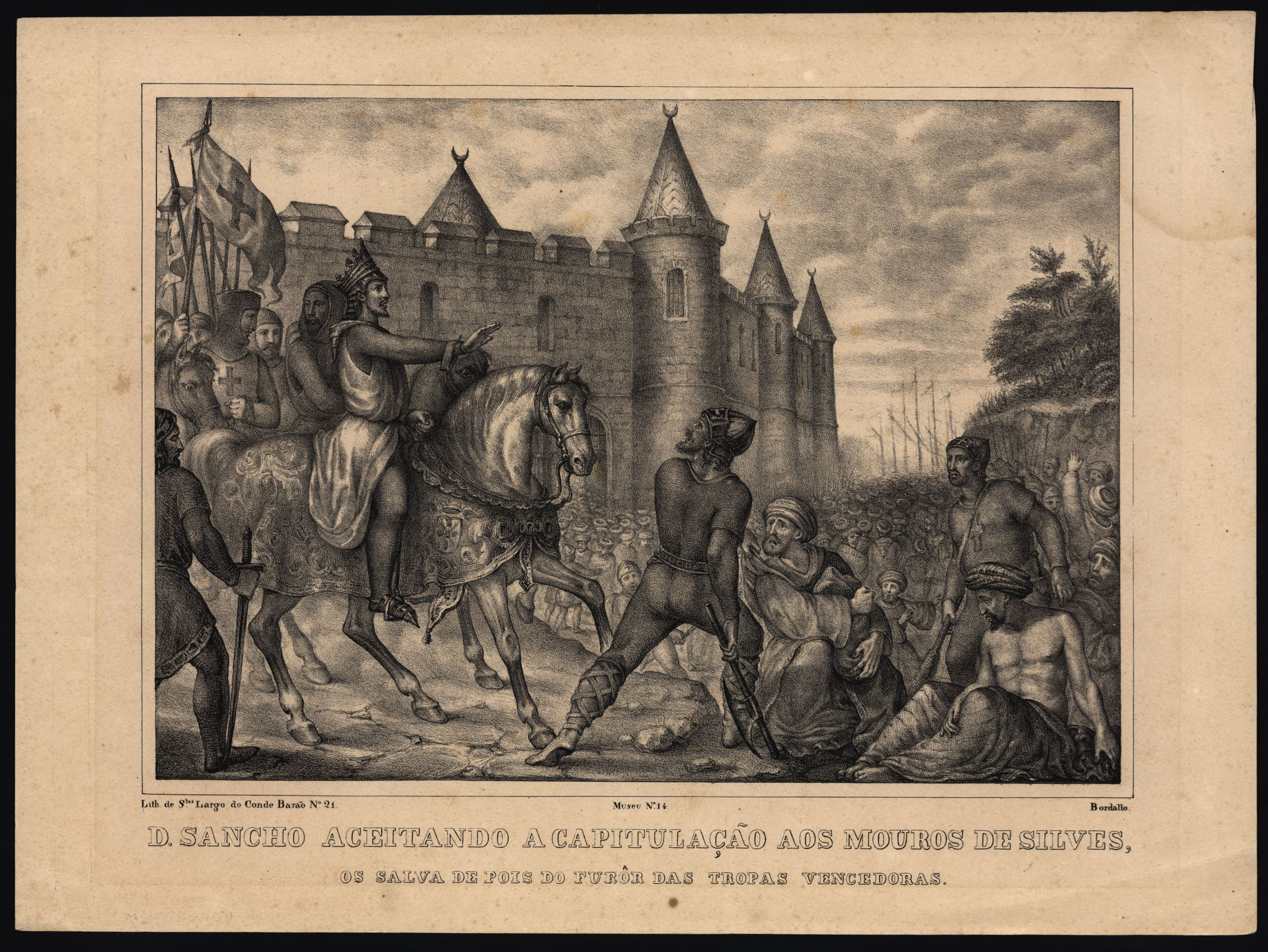 D. Sancho aceitando a capitulação aos mouros de Silves, os salva depois do furôr das tropas vencedorastitle QS:P1476,pt:"D. Sancho aceitando a capitulação aos mouros de Silves, os salva depois do furôr das tropas vencedoras" label QS:Lpt,"D. Sancho aceitando a capitulação aos mouros de Silves, os salva depois do furôr das tropas vencedoras"